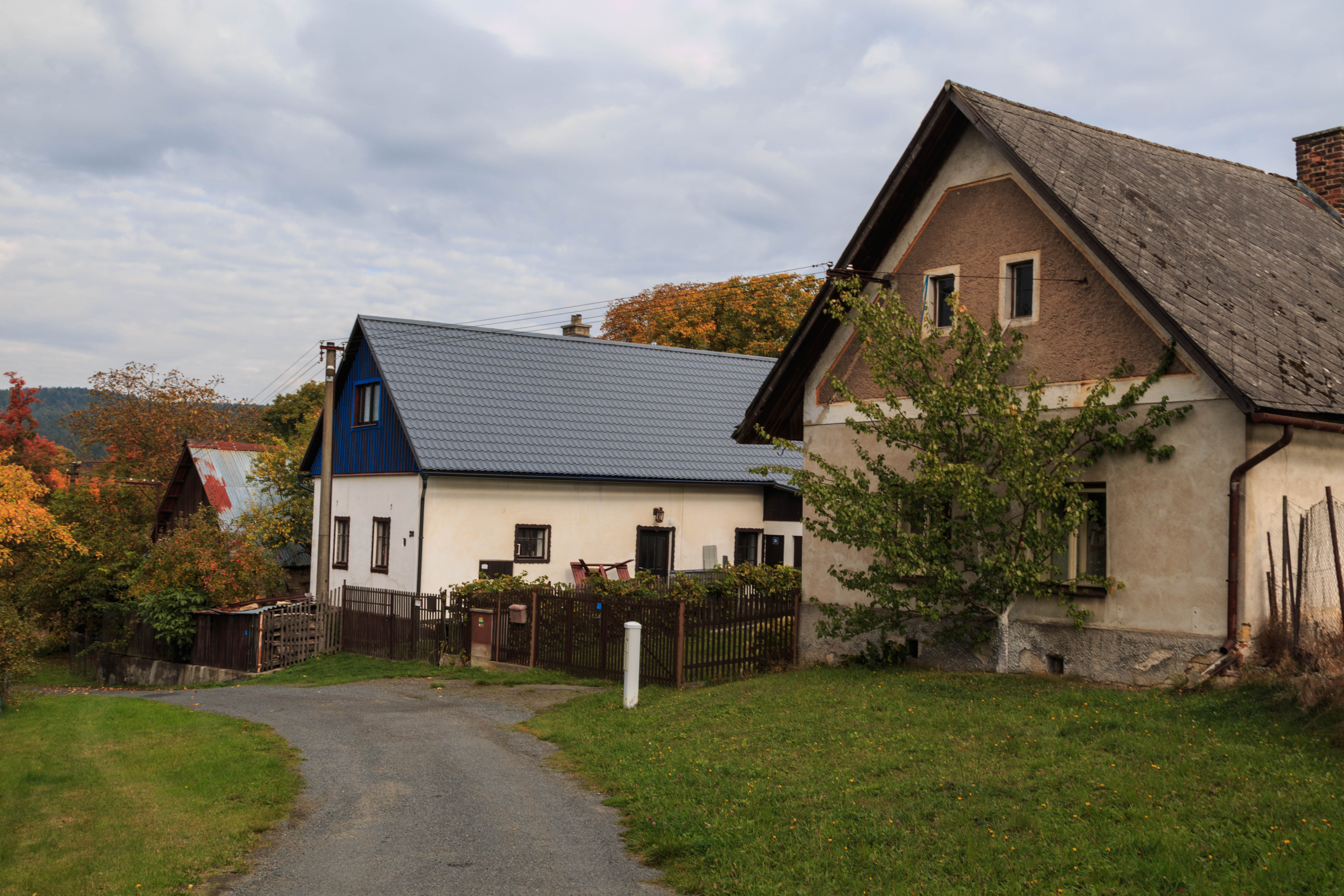 Lány č. 26